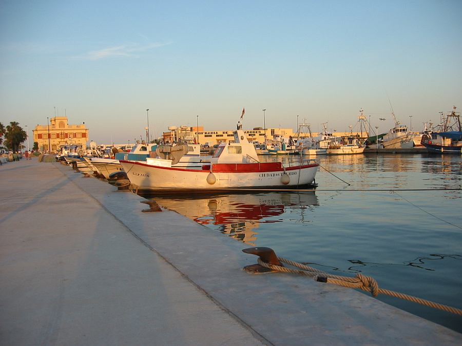 Vista del puerto de Santa Pola (Alicante). Port at Santa Pola (Alicante).